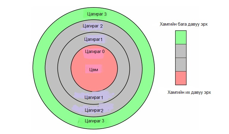 Монгол: x86 CPU дээрх Kernel mode(цөмийн горим)хамгаалах 4 цагираг